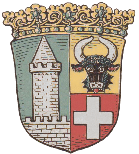 Wappen des Freistaates Mecklenburg-Strelitz zur Zeit der Weimarer Republik.